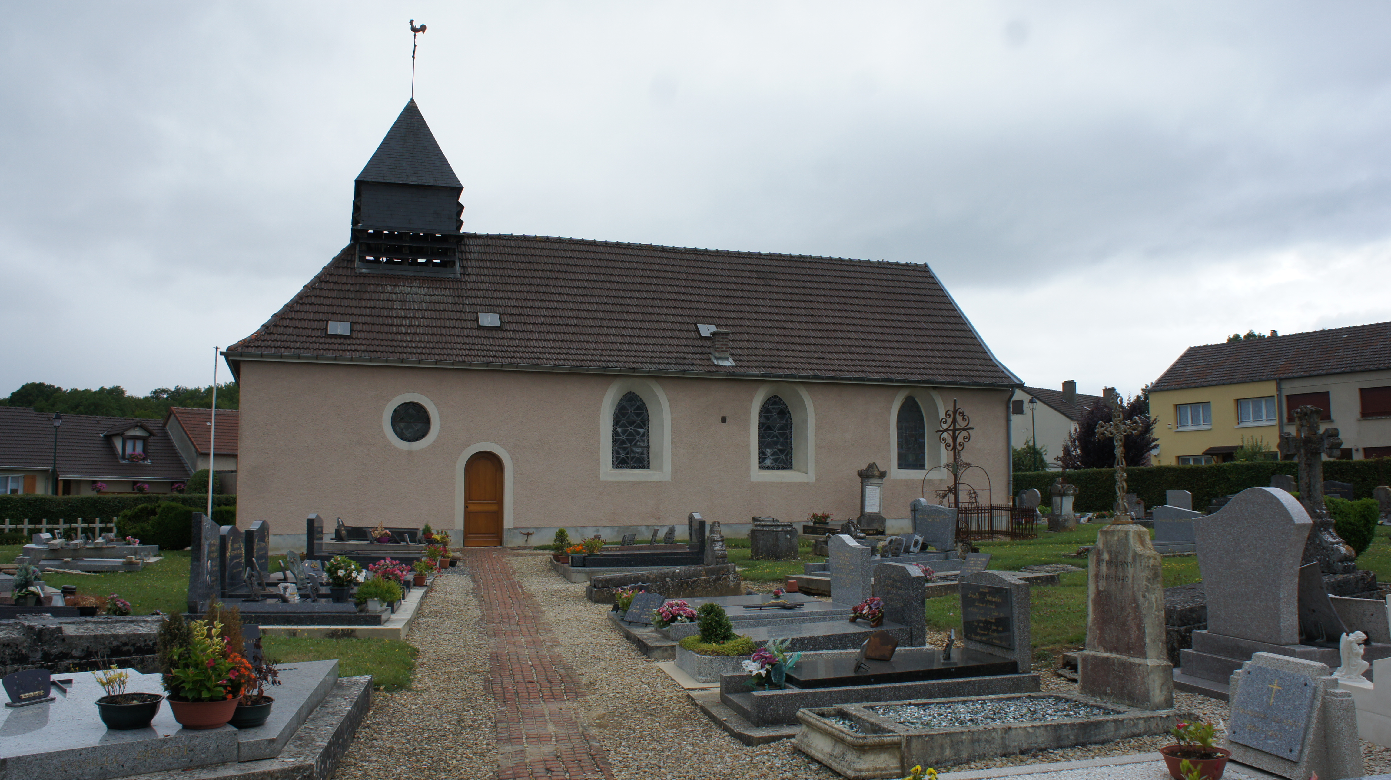 Au village de Saint-Imoges.